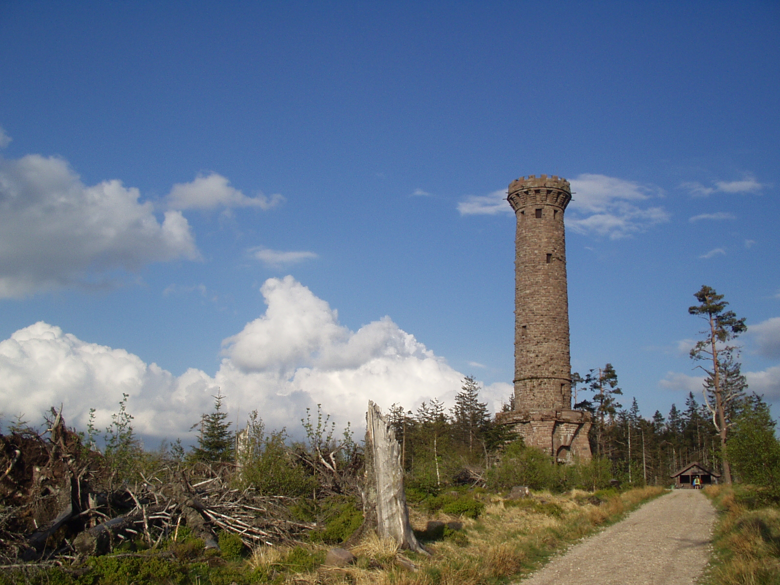 Friedrichsturm, Badener Höhe Der 30 Meter hohe Turm wurde durch die Stadt Baden-Baden und dem Schwarzwaldverein am höchsten Punkt der Gemarkung Baden-Baden (1002,5 müNN) auf der Badener Höhe erbaut, angrenzend an die Gemarkungen Herrenwies und Murgschifferschaft. Grundsteinlegung: Am 9. Juni 1890 durch Großherzog Friedrich von Baden. Einweihung: Am 5. Oktober 1891.